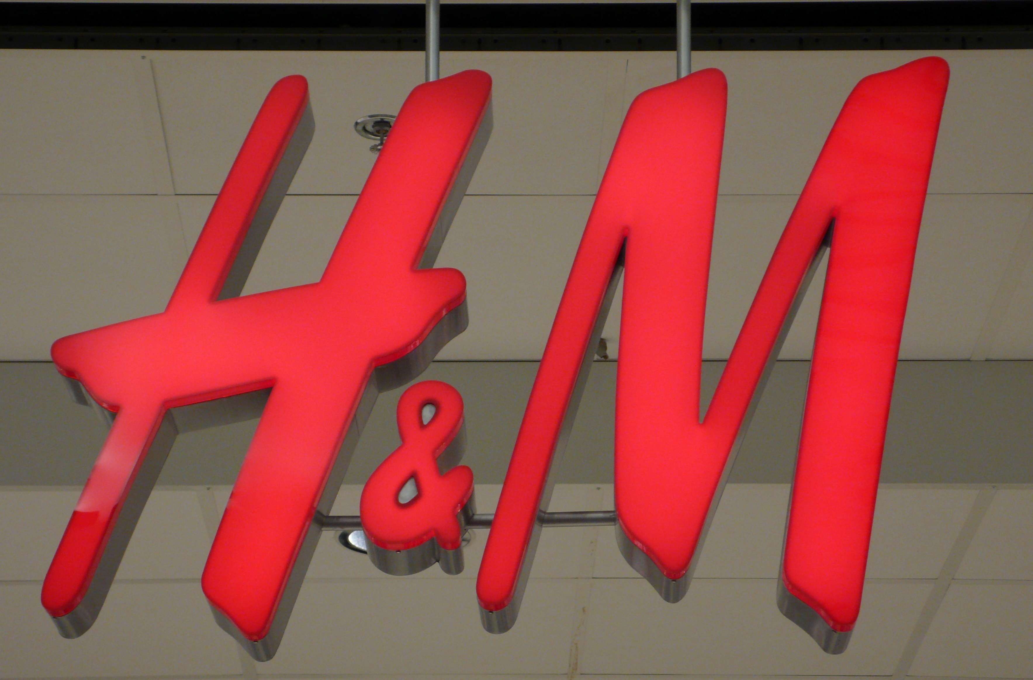 H&M Schild an einem Laden in Schweden